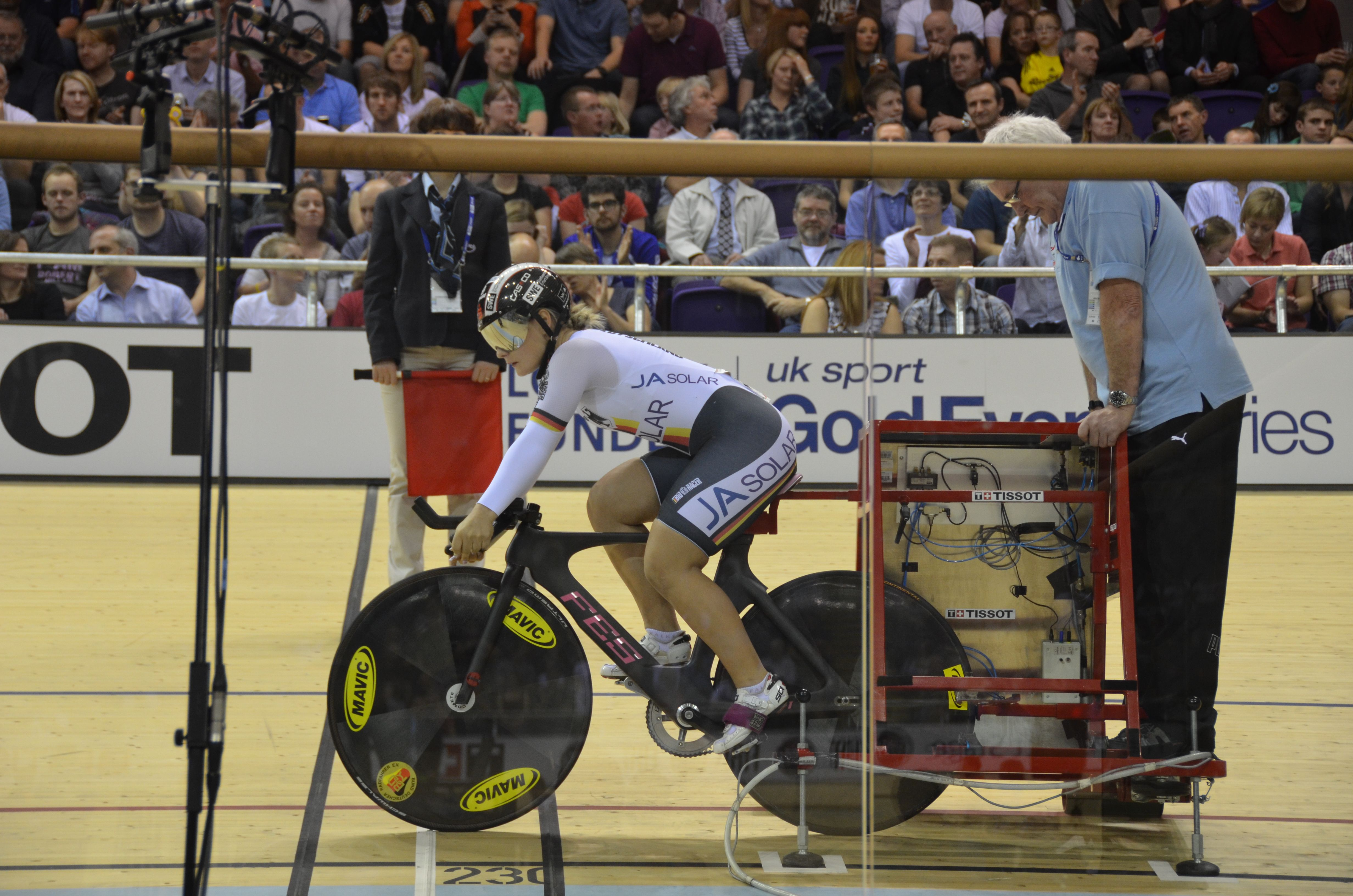 Kristina Vogel beim Start zum Zeitfahren, Bahnrad-Weltcup in Glasgow 2012